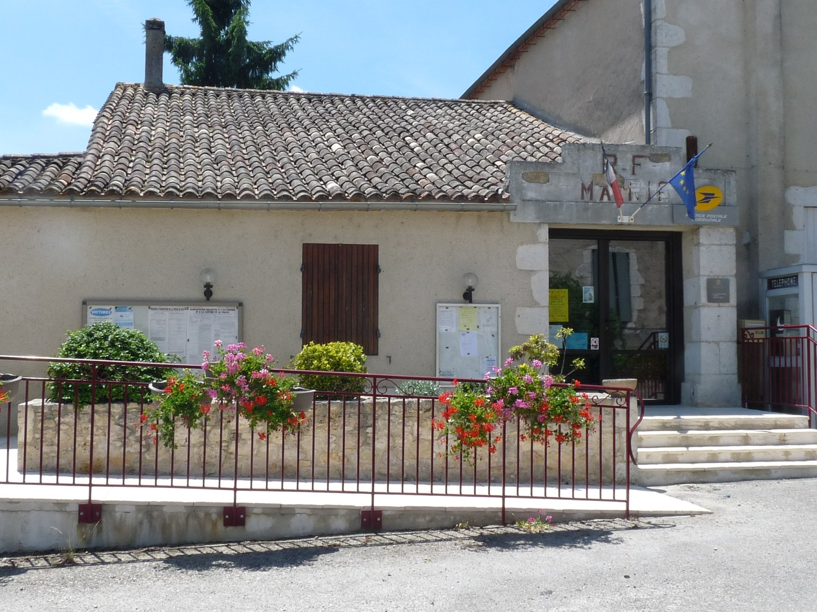 Mairie et poste de Villeneuve-de-Duras, Lot-et-Garonne, France